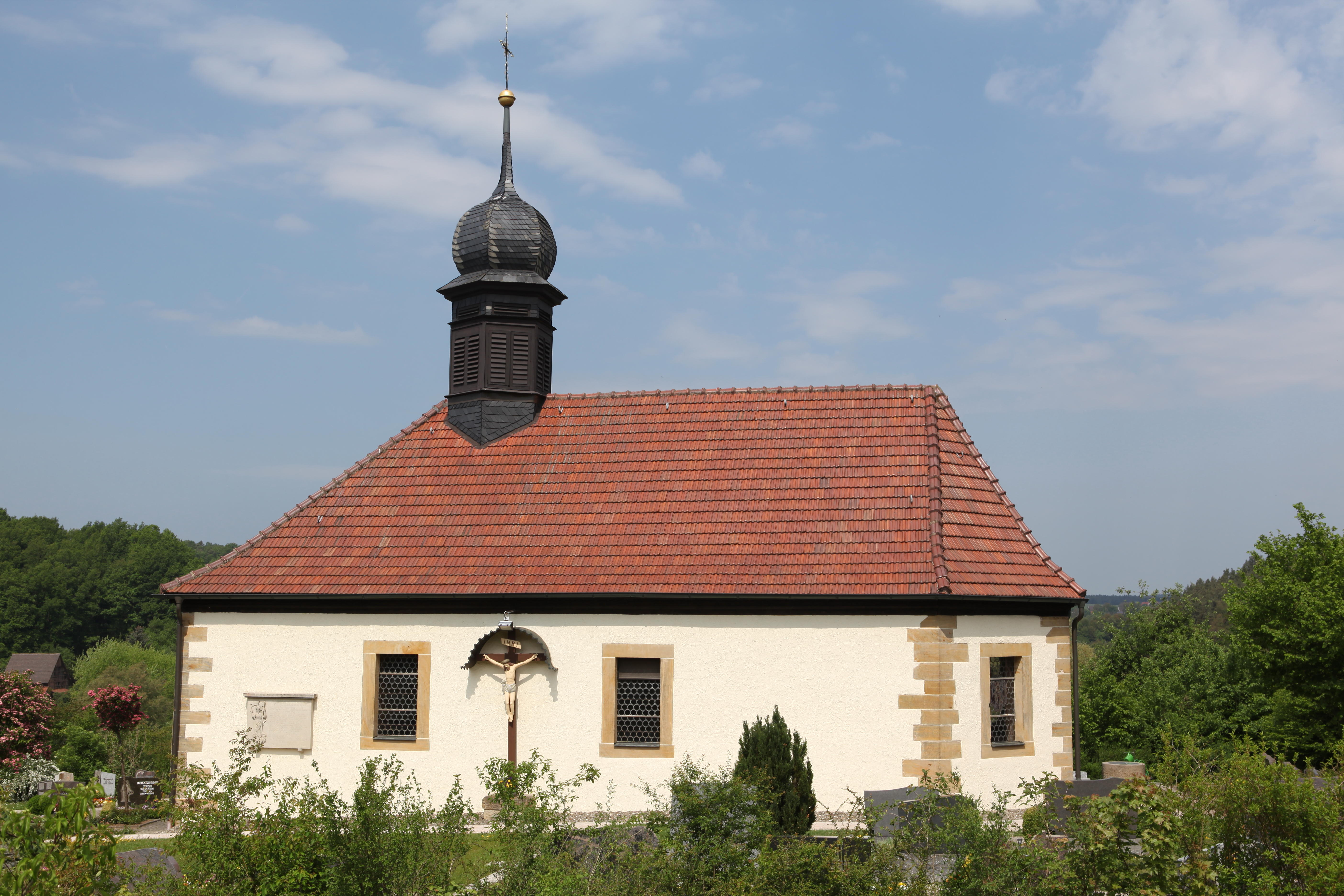 Katholische Filialkirche Mater dolorosa (Mariä Schmerzen), Altenhof, Landkreis Coburg